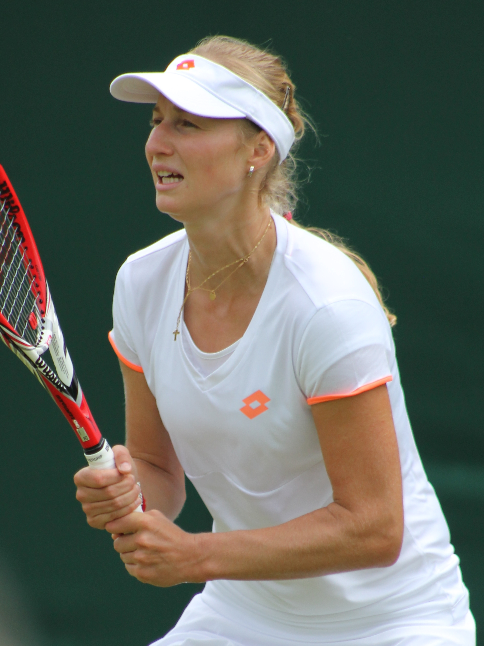 Makarova WM14 (3)